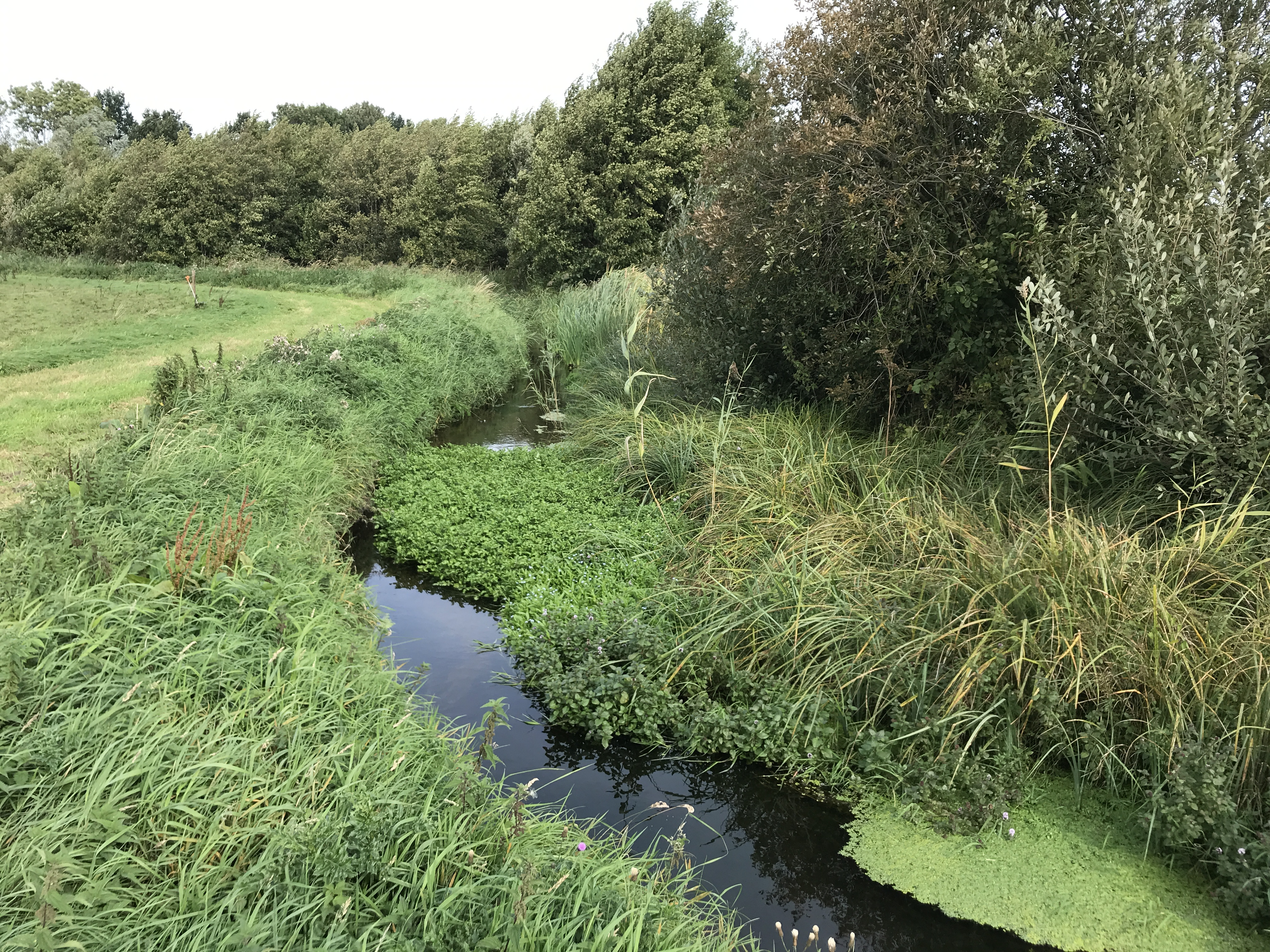 Een begroeide meander van de Killenbeek even ten zuiden van Hoophuizen bij Nunspeet